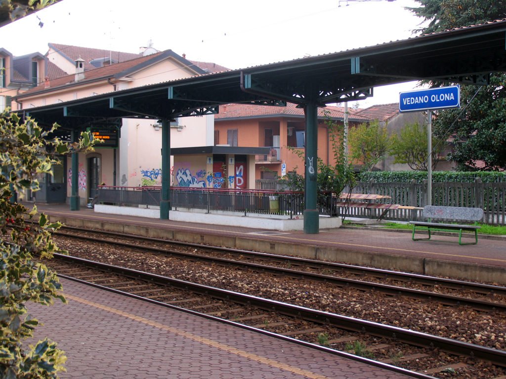 Vadano Olona